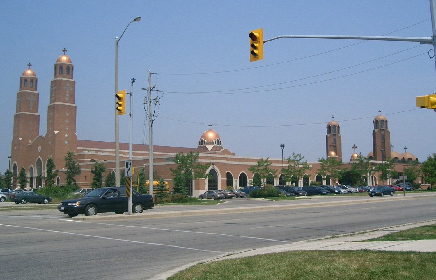 Mississauga, Religijno-kulturalne Centrum Koptyjskie